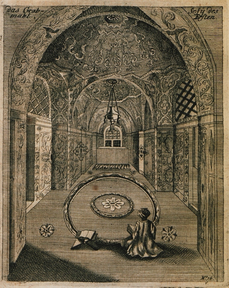 CHARDIN, John, Sir. Des vortrefflichen Ritters Chardin des grossen Königs in Persien Hoff-Handelsmanns, Curieuse Persian- und Ost-Indische Reise-Beschreibung, Bestehend in einem ordentlichen Journal Oder Täglichen Verzeichnüß seiner in Persien und Ost-Indien über das schwartze Meer und den Cholchidem abgelegter Reisen, Erstlich vom Authore selbst in Frantzösischer Sprach beschrieben / nachgehends in die Englische; anitzo aber wegen seiner Wortreffligkeit in die Hochdeutsche übersezt / mit schönen Rupffern geziret / und nöthigem Register versehen, Leibzig, [Gleditsch, 1687].